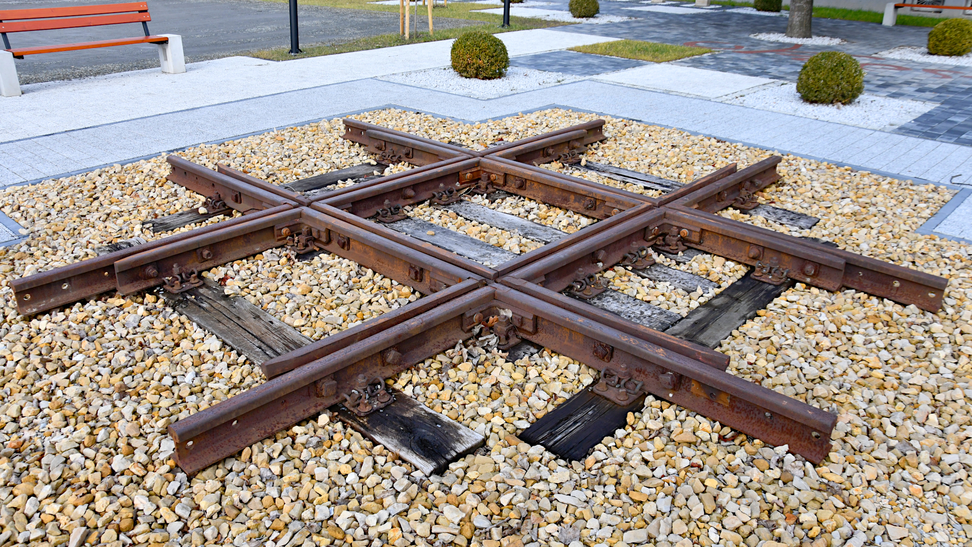 Dawne skrzyżowanie linii kolejowych 169 i 159 w Orzeszu, obecnie umieszczone jako pomnik koło urzędu miasta.